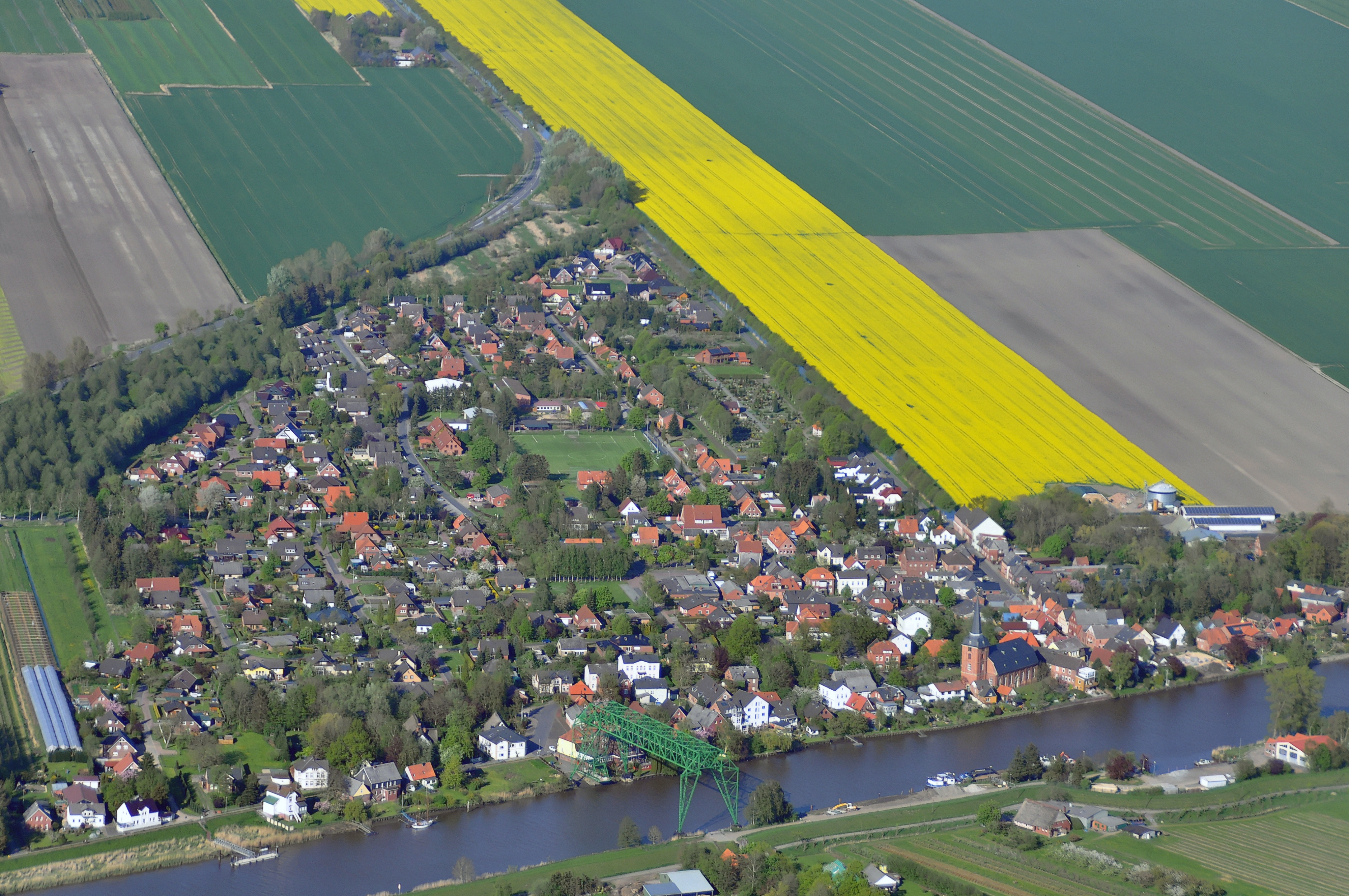 Luftbilder von der Nordseeküste 2012-05